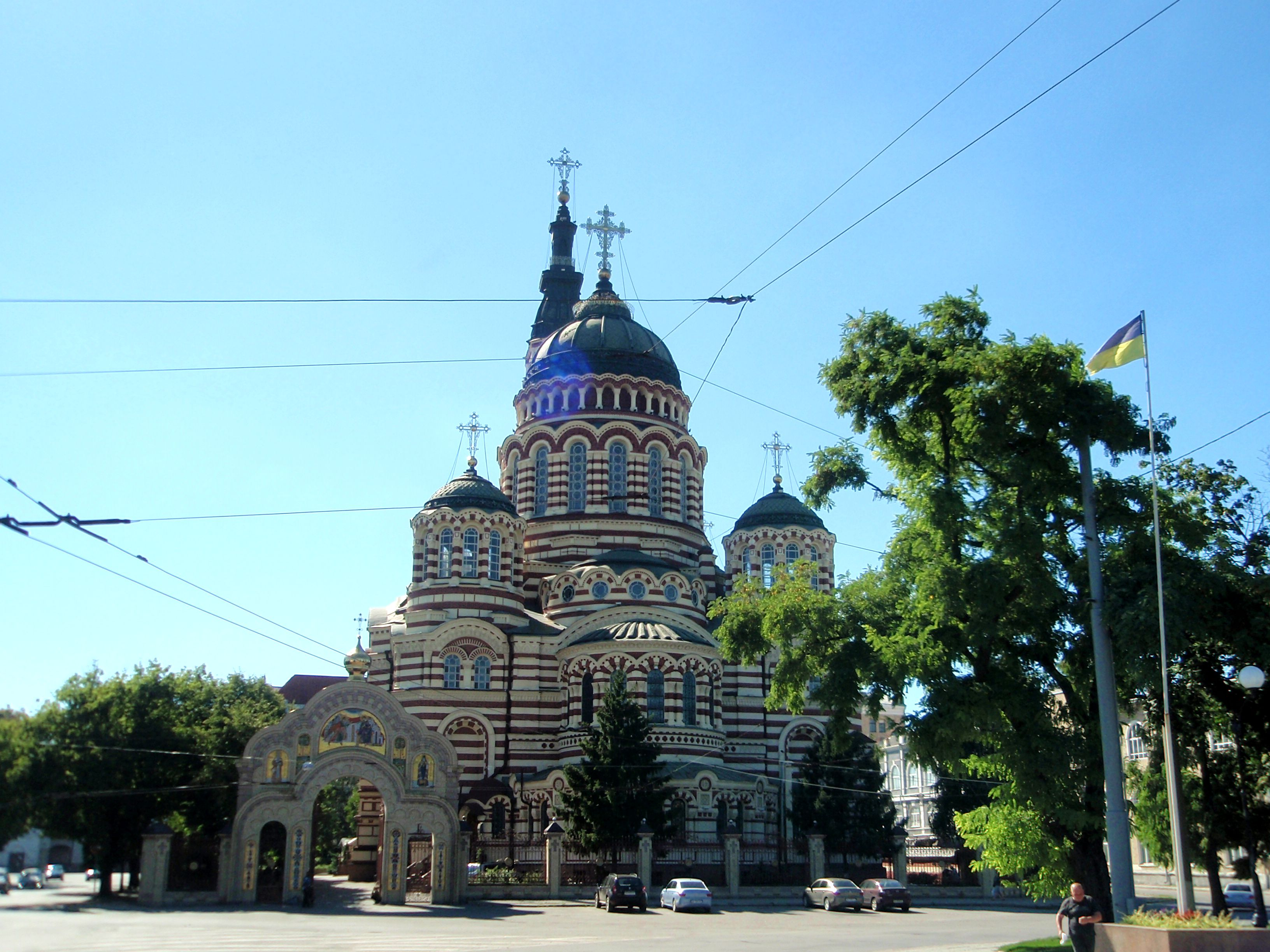 Благовіщенський собор, Харків, вул. Різдвяна (Енгельса), 12